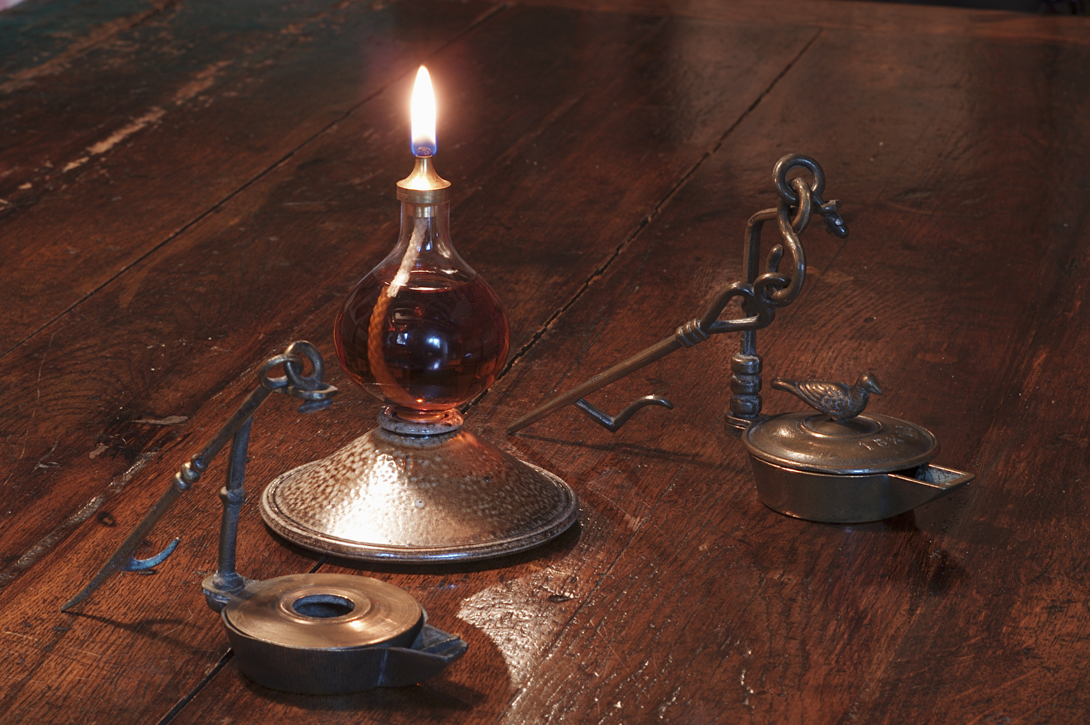 INRA, Jean Weber